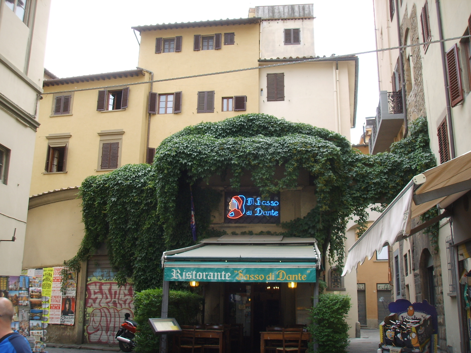 Piazza delle pallottole